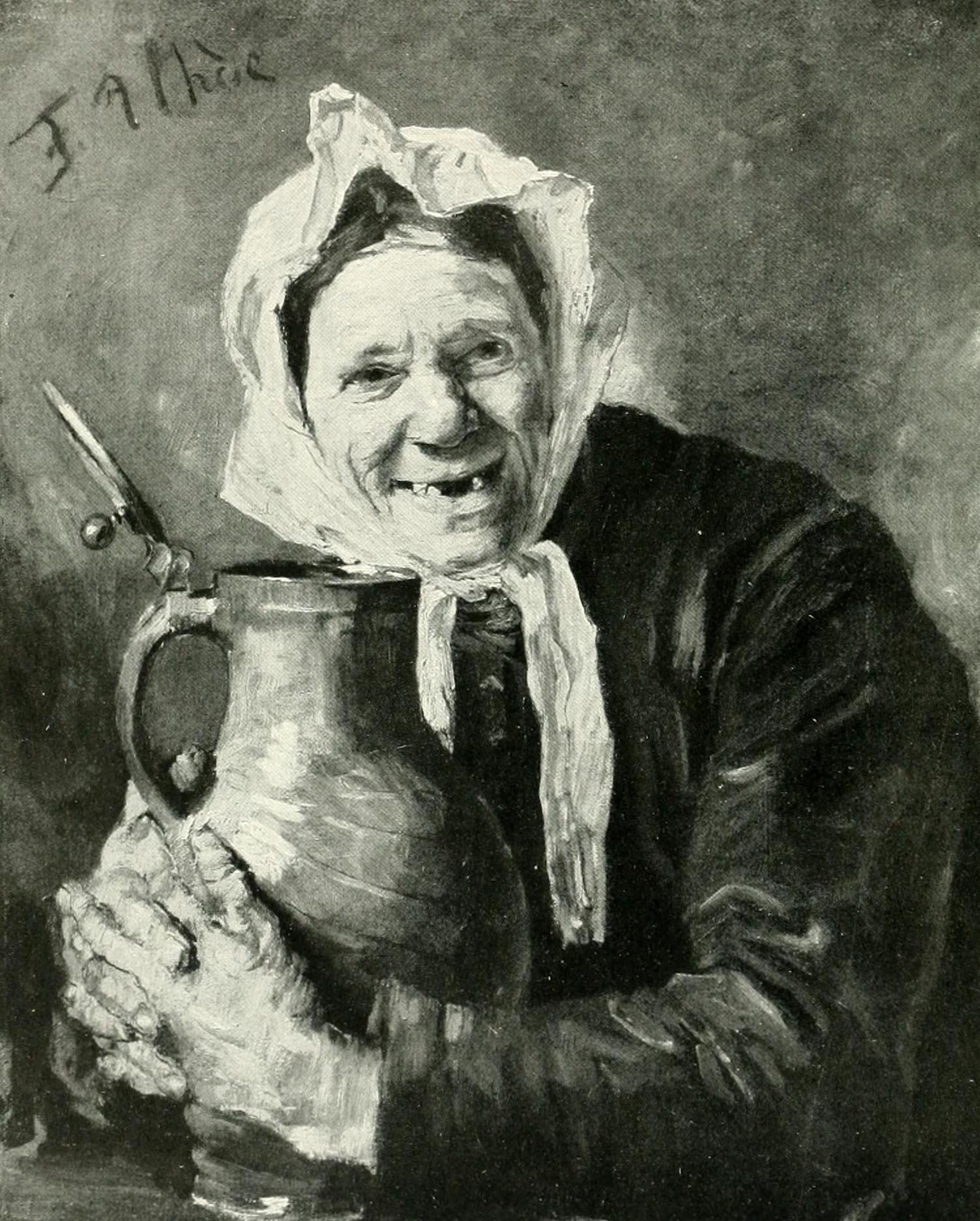 "Altes Weib mit Bierkrug" (Old woman with a beer-jung)